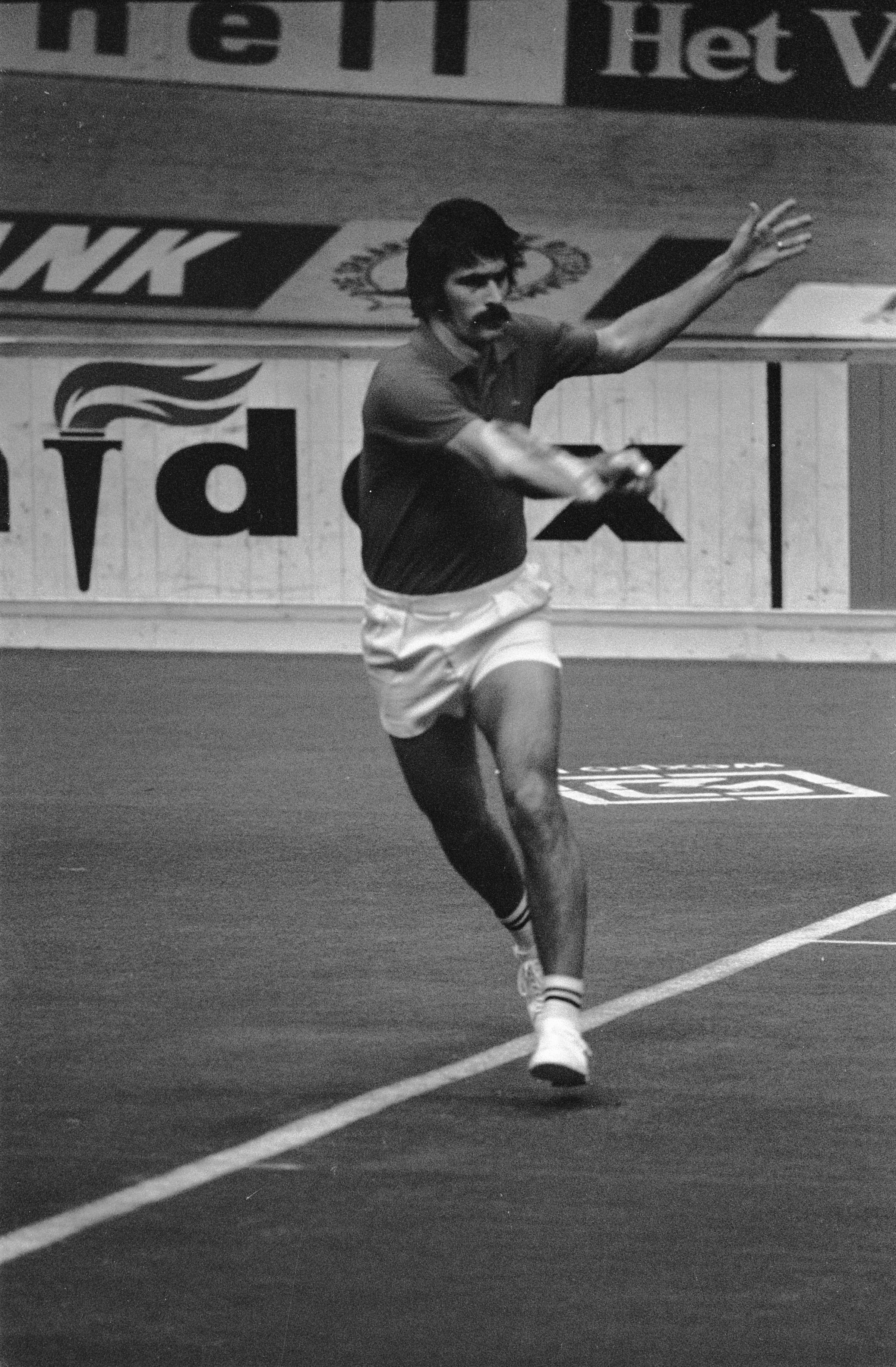 Collectie / Archief : Fotocollectie Anefo Reportage / Serie : [ onbekend ] Beschrijving : Proftennis in Ahoyhal, Rotterdam, Marty Riessen in aktie Datum : 14 november 1972 Locatie : Rotterdam, Zuid-Holland Trefwoorden : tennis Instellingsnaam : Ahoy Fotograaf : Verhoeff, Bert / Anefo Auteursrechthebbende : Nationaal Archief Materiaalsoort : Negatief (zwart/wit) Nummer archiefinventaris : bekijk toegang 2.24.01.05 Bestanddeelnummer : 926-0228